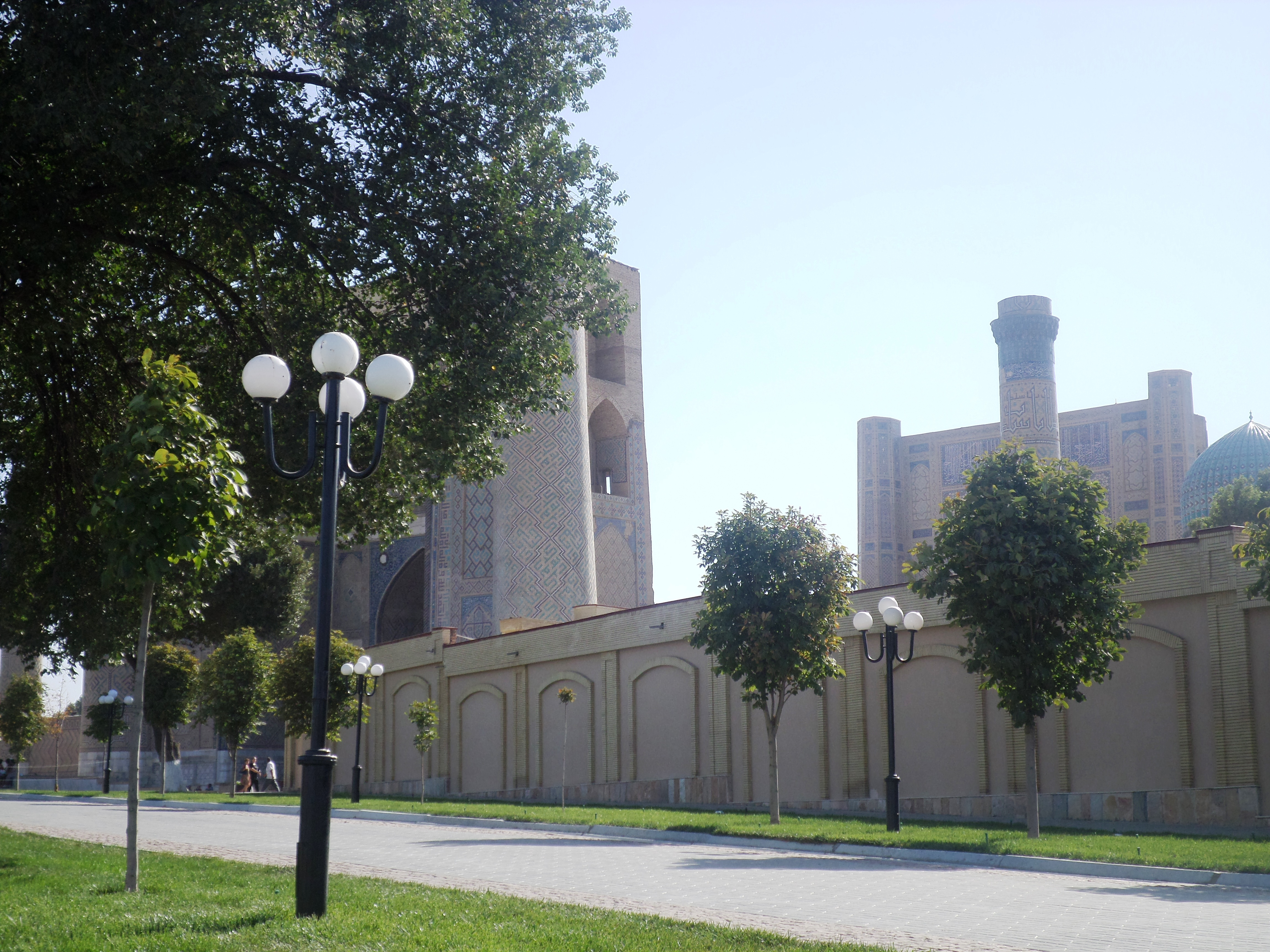 Достопримечательности Самарканда, Мечеть Биби Ханум